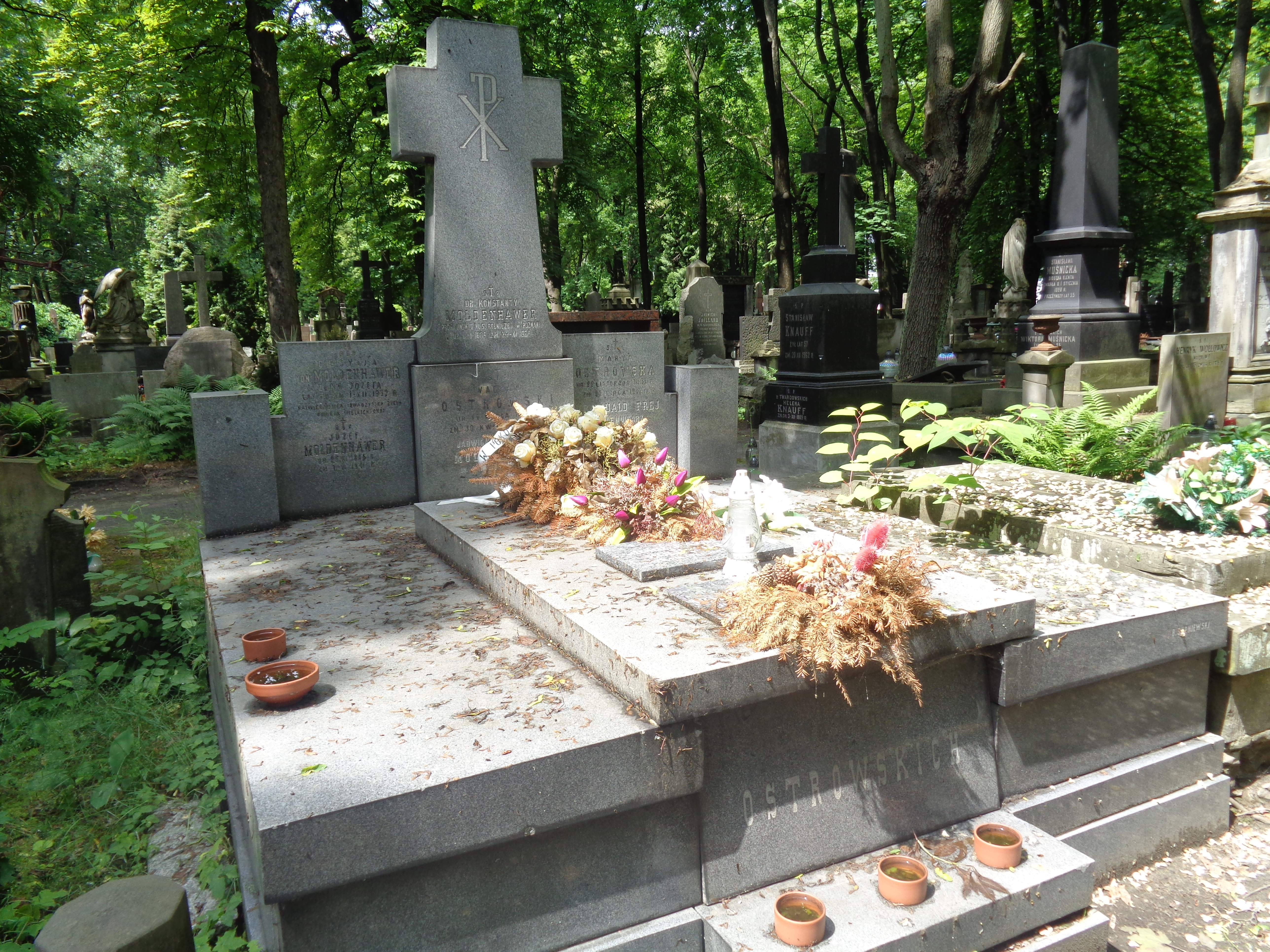 Grób Konstantego Moldenhawera na Cmentarzu Powązkowskim